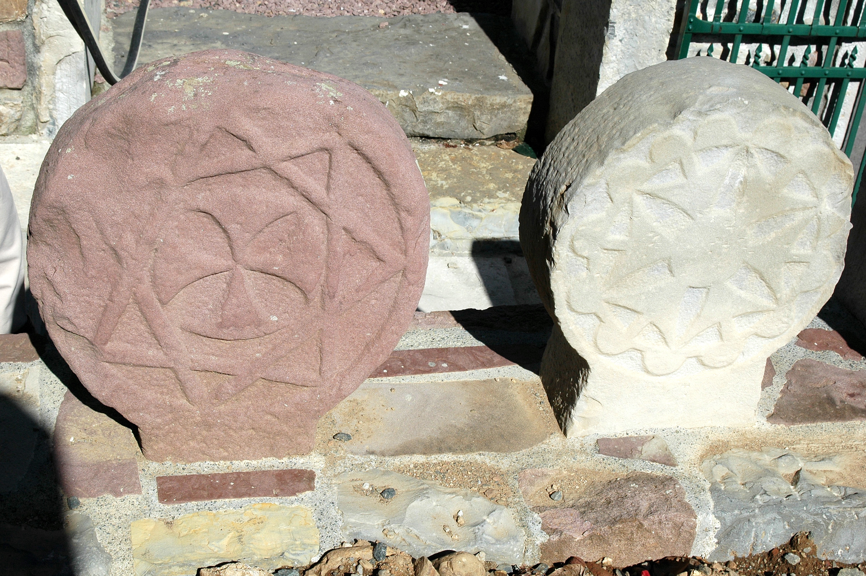 Ossès, stèles discoïdales. Photo prise le 03/08/06 par Harrieta171